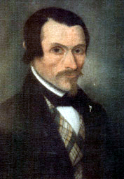 Nils Lilja, 1830-tal